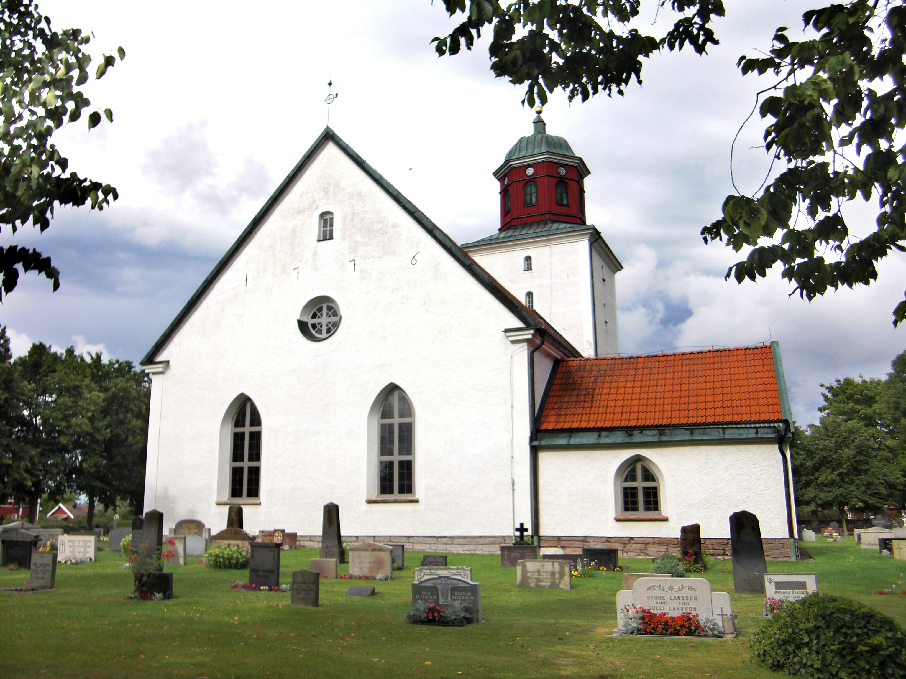 Torslunda kyrka på Öland, Sverige.